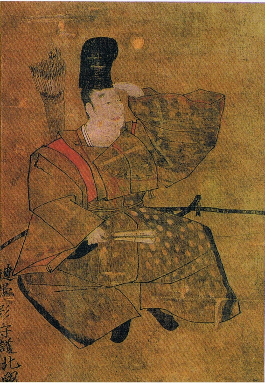 伝島津忠久画像。絹本著色。京都の高山寺に伝えられていたもの。松方正義筆の「忠久公画像記」によれば、元治元年（1864年）に島津久光が本作品を見て、のちに島津忠義が松方正義に依頼して明治31年（1898年）、島津家に譲られたという。